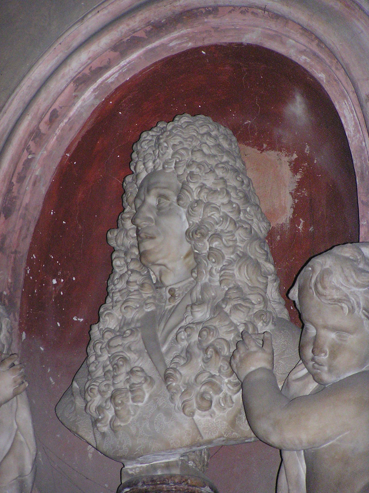 Dom von Arezzo - Frascesco Redi Ort & Datum: Oktober 2005